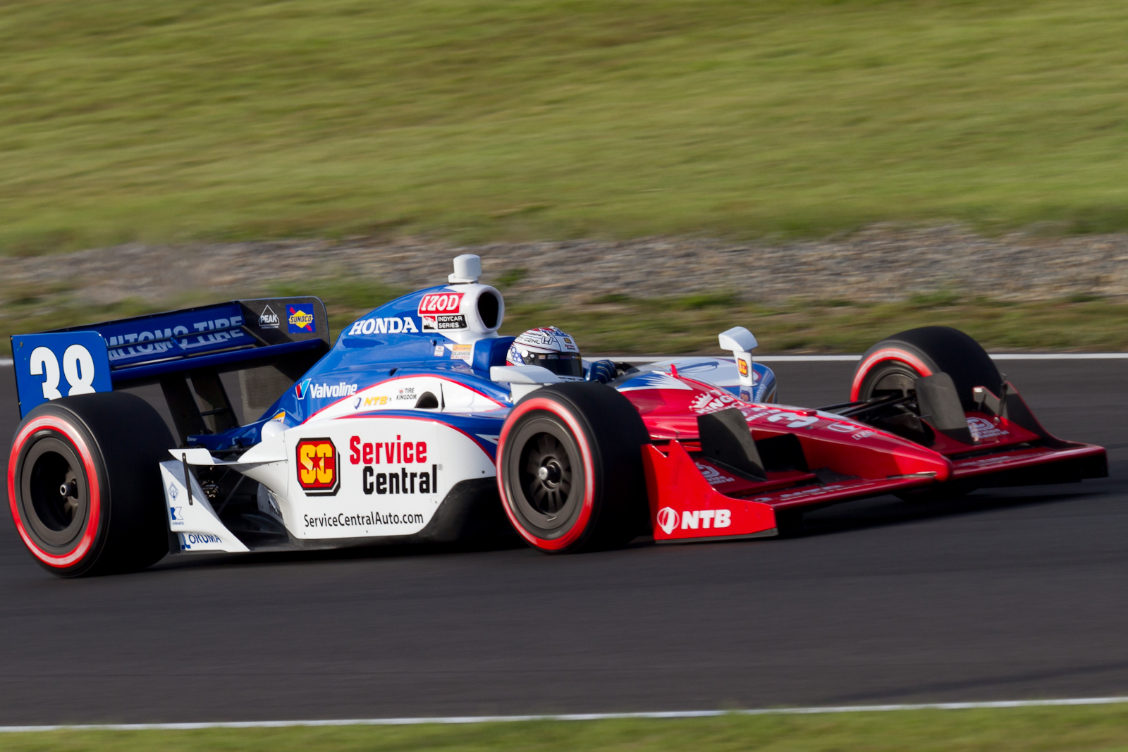 IndyCar Series 2011 Rd.15 Indy Japan 300: Graham Rahal (Chip Ganassi Racing)